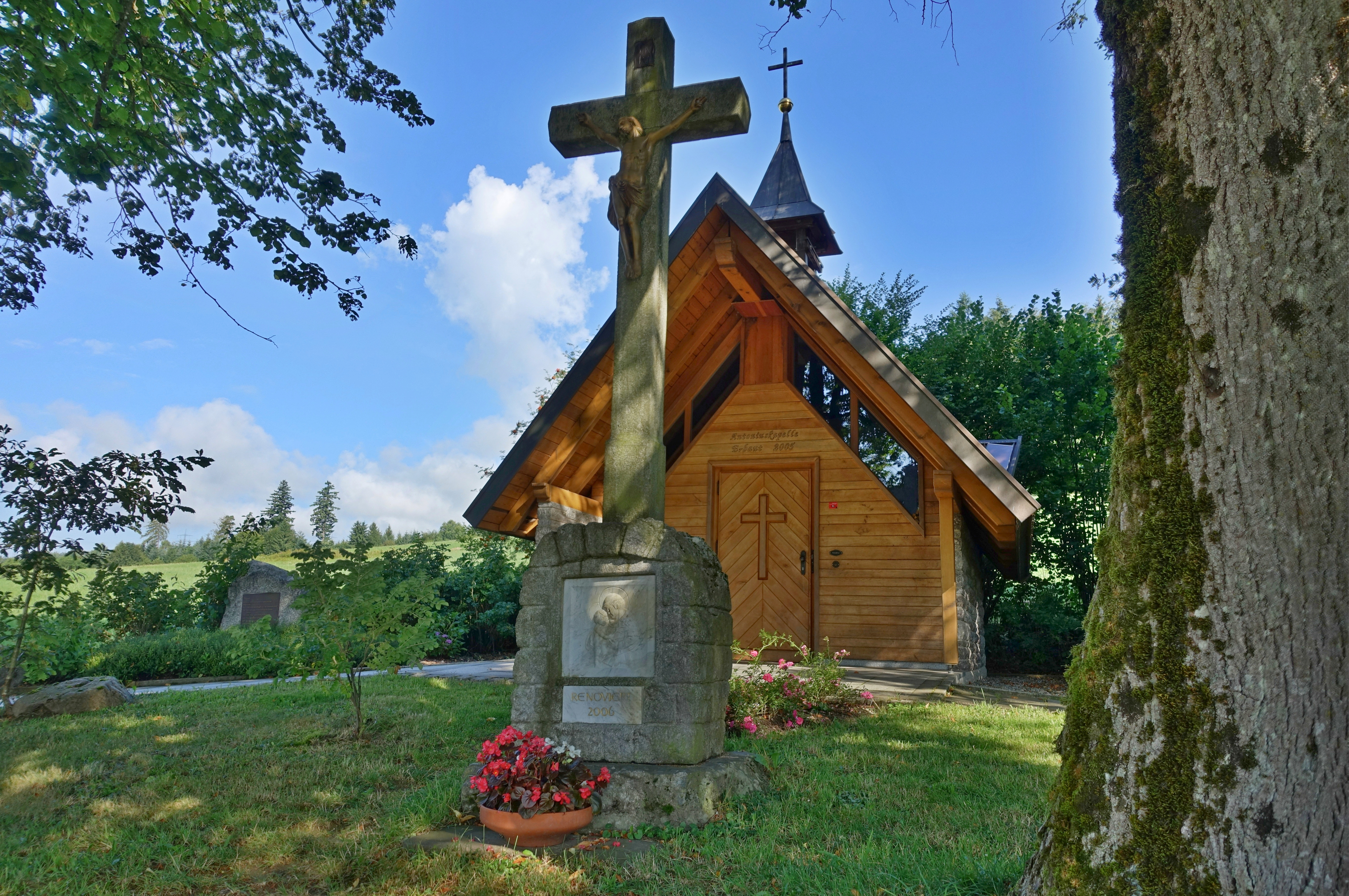 Die Antoniuskapelle wurde 2005 neu erbaut. Vor 1845 stand hier ein Wirtschaftsgebäude mit Kapelle, die infolge von Baufälligkeit abgerissen wurde.